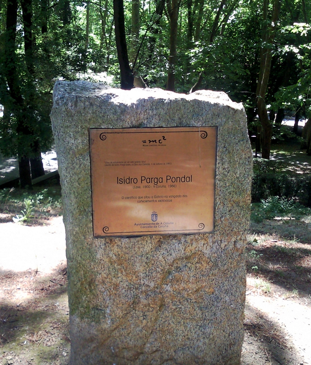 Homenaxe a Isidro Parga Pondal no parque de santa margarida da Coruña